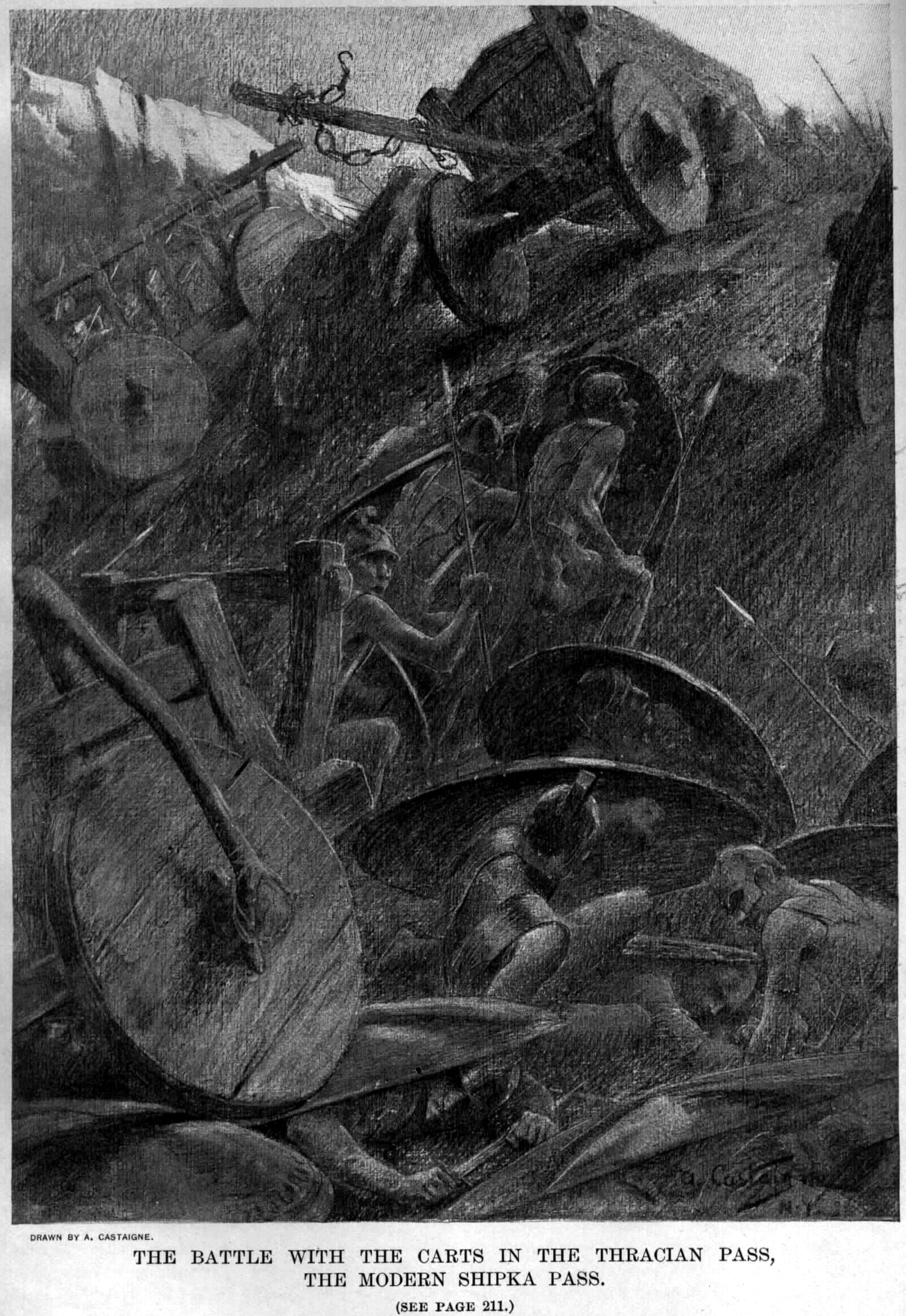 Alexander old drawings